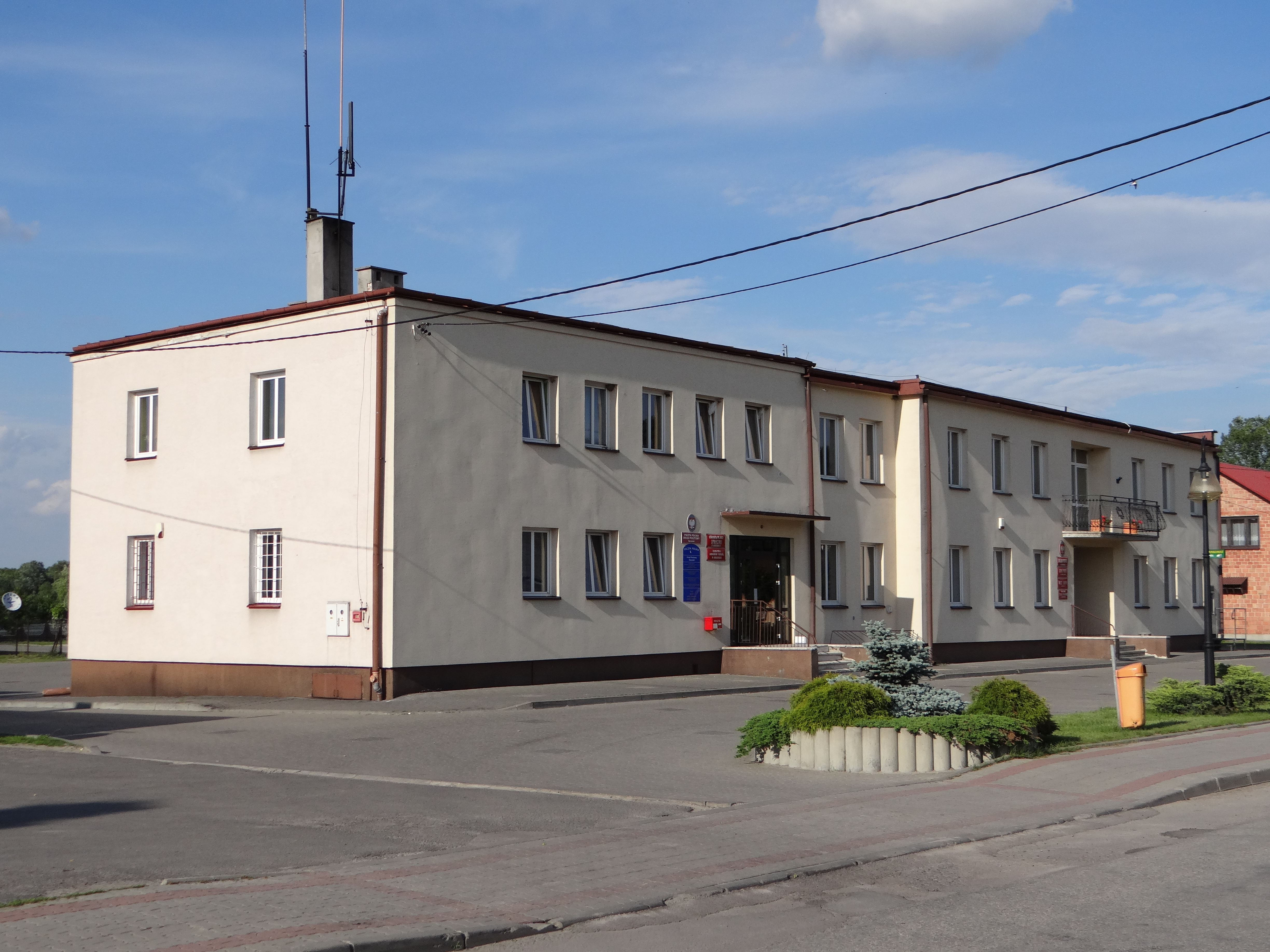 Budynek Urzędu Gminy w Harasiukach